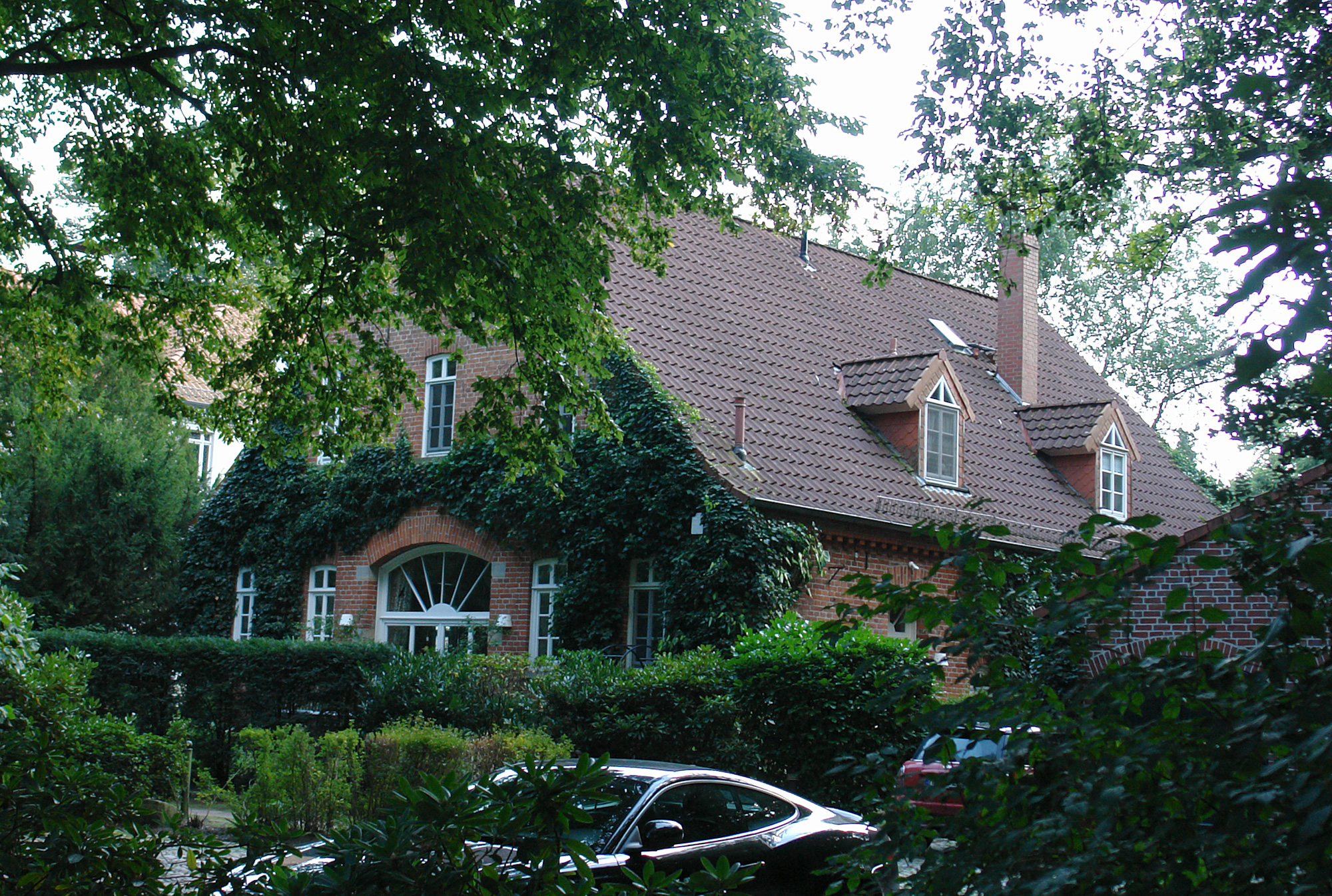 Hofmeierhaus in Bremen, Oberneulander Landstraße 67.Das abgebildete Objekt ist ein geschütztes Kulturdenkmal in der Freien Hansestadt Bremen, mit der Nr. 1731 beim Landesamt für Denkmalpflege registriert.